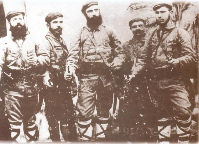 Yane Sandanski